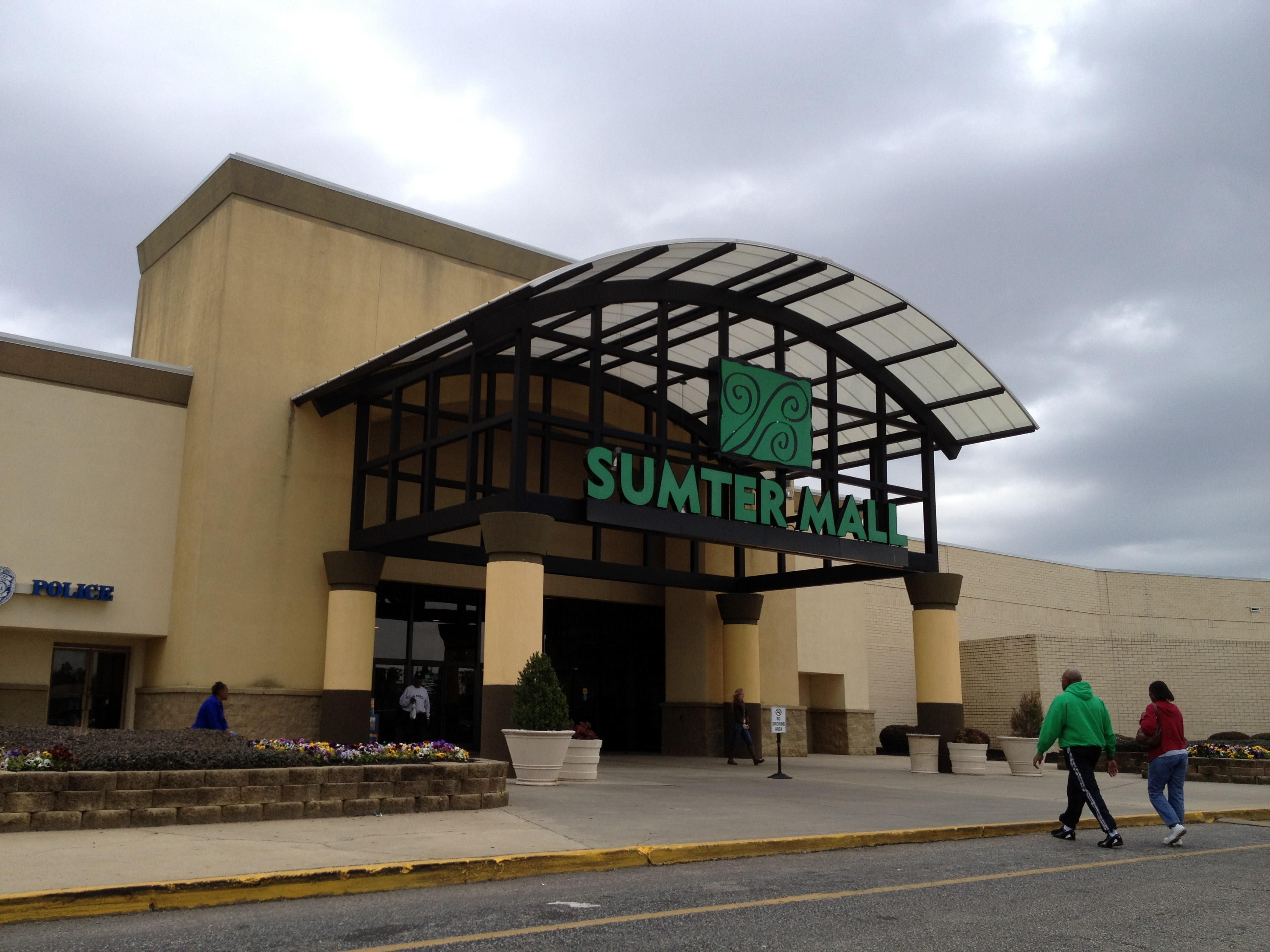 Sumter Mall Sumter, SC February 2012